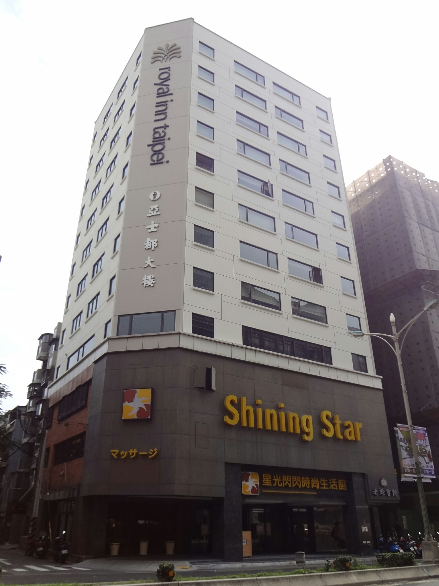 中文（台灣）: 亞士都大樓，位於臺北市中山區林森北路83號。老爺會館台北林森位於4樓。